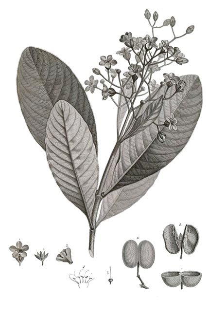 Illustration of Platycarpum orenocense 104 (Platycarpum orinocense Bonpl., ) from Plantes équinoxiales recueillies au Mexique : dans l'île de Cuba, dans les provinces de Caracas, de Cumana et de Barcelone, aux Andes de la Nouvelle Grenade, de Quito et du Pérou, et sur les bords du rio-Negro de Orénoque et de la rivière des Amazones. / Voyage de Humboldt et Bonpland